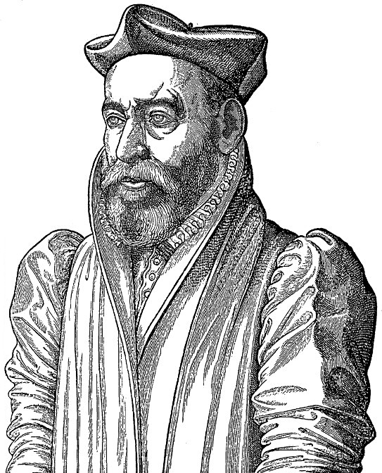 Portrait de Philibert Delorme d'après son Traité d'Architecture